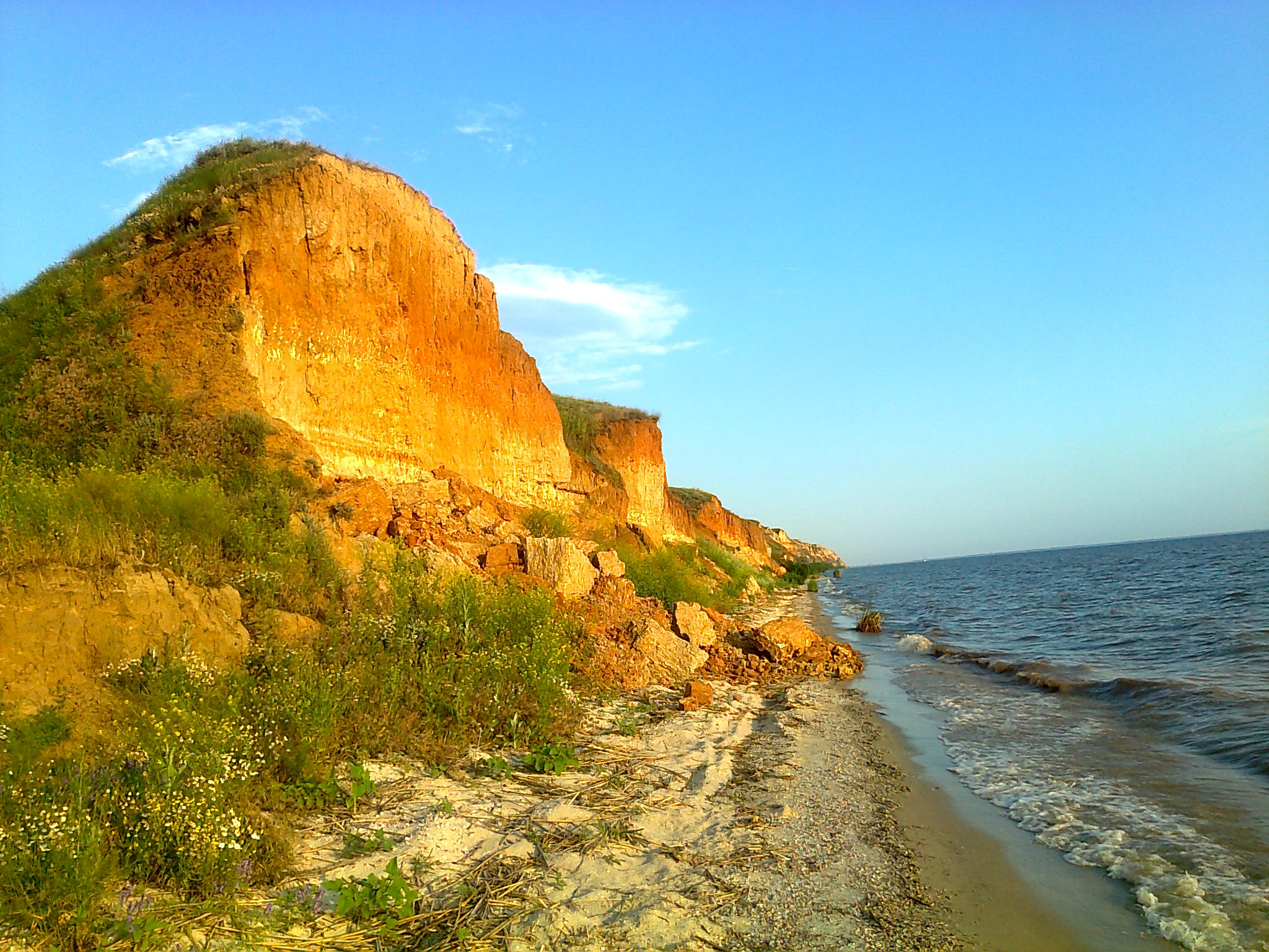 «Олександрівський», Білозерський район, с. Олександрівка